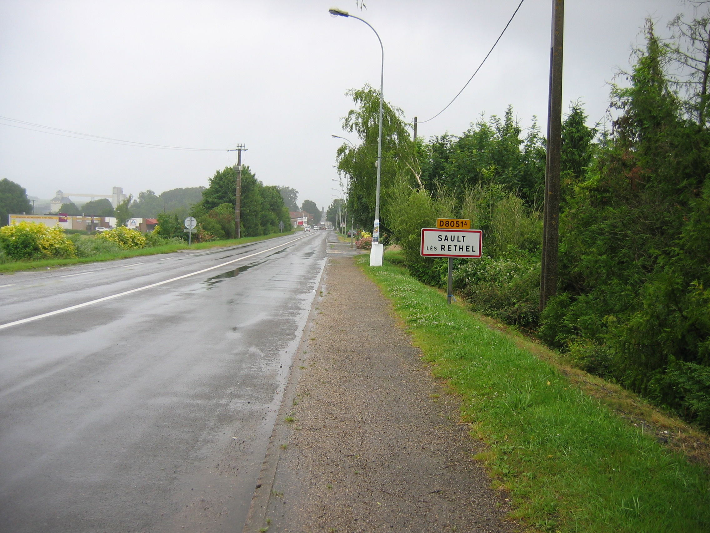 Entrée de Sault les Rethel, Ardennes, France